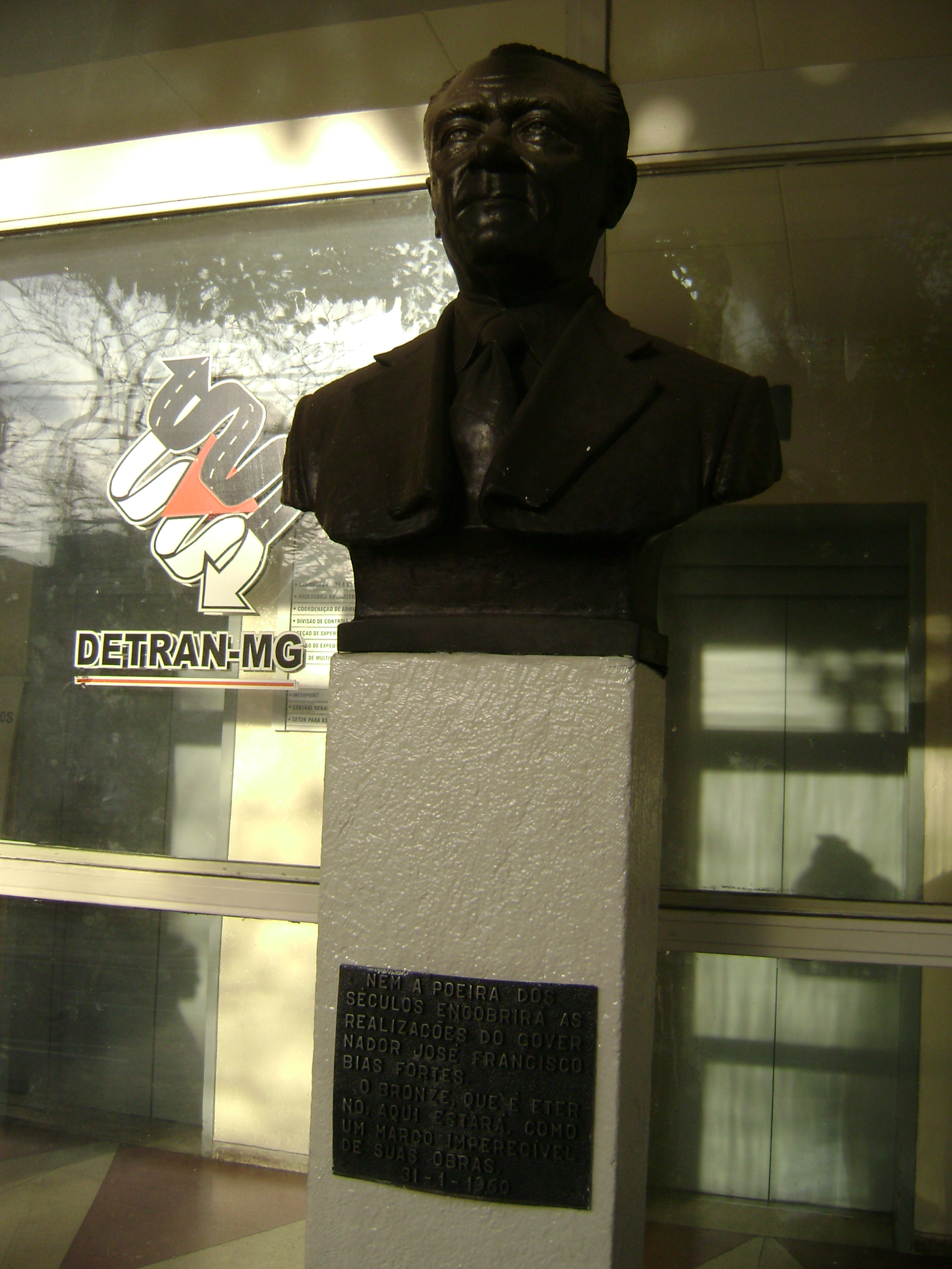 Estátua de Bias Fortes na entrada do DETRAN de Belo Horizonte, Brasil.